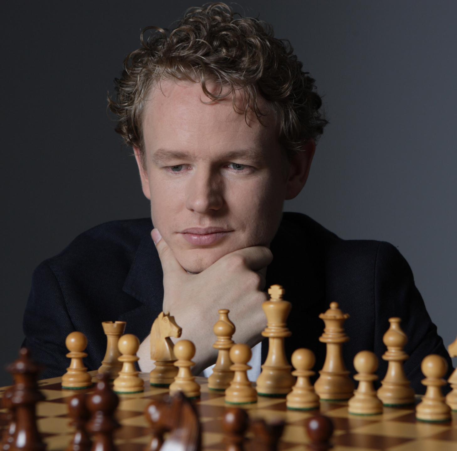 Jan Gustafsson 2010